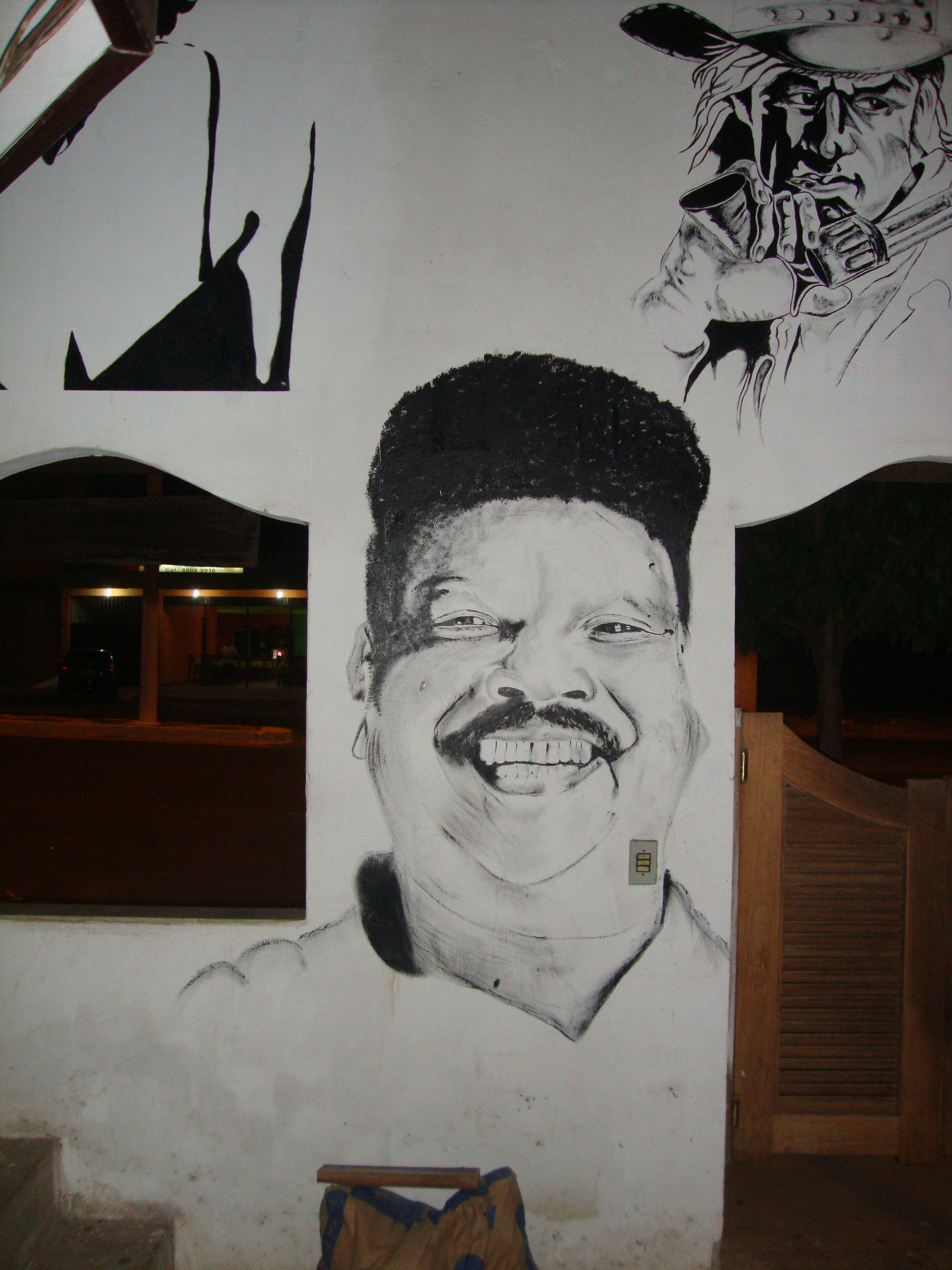 Caricatura Tim Maia